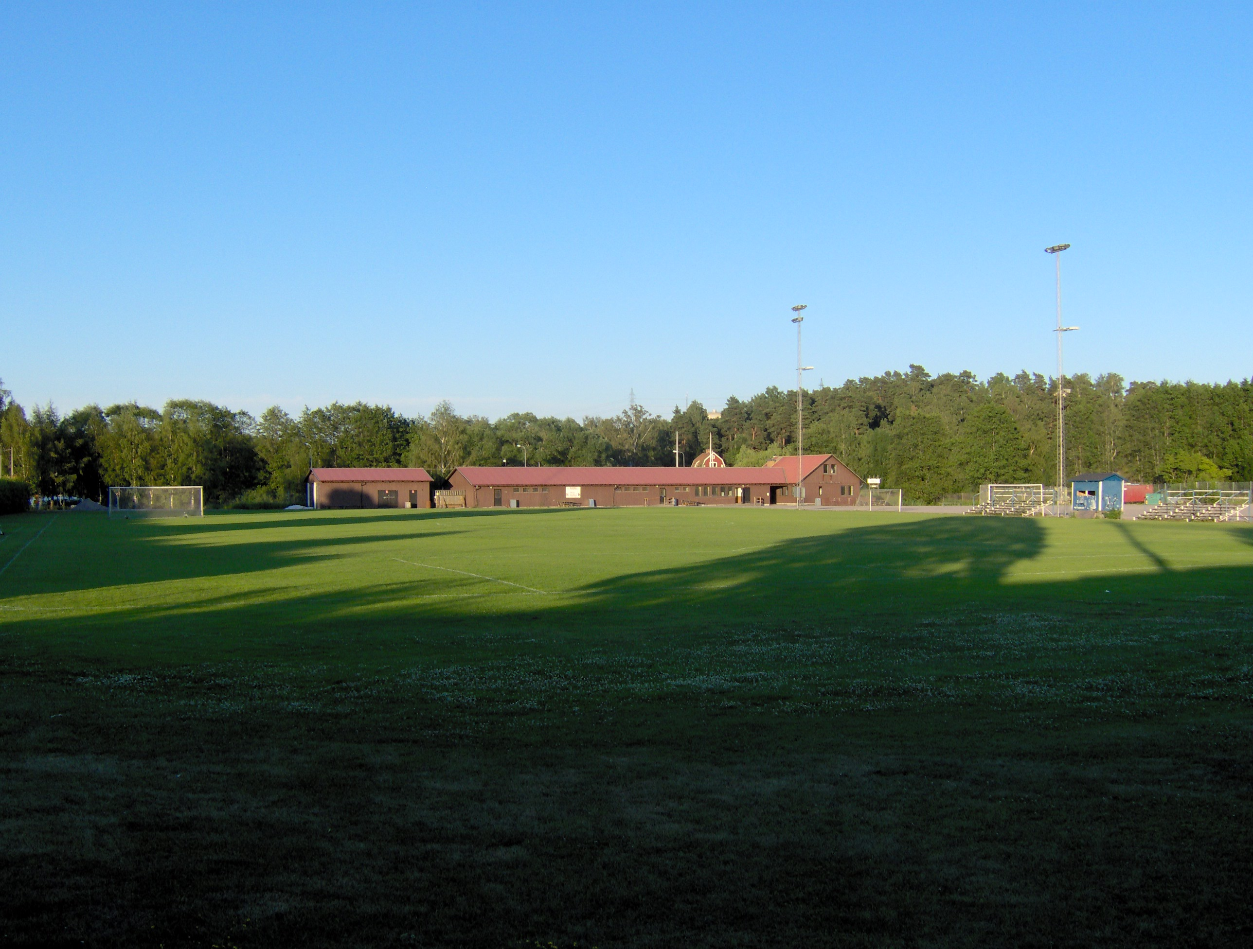 Picture of Norrvikens IP. Bild på Norrvikens IP.